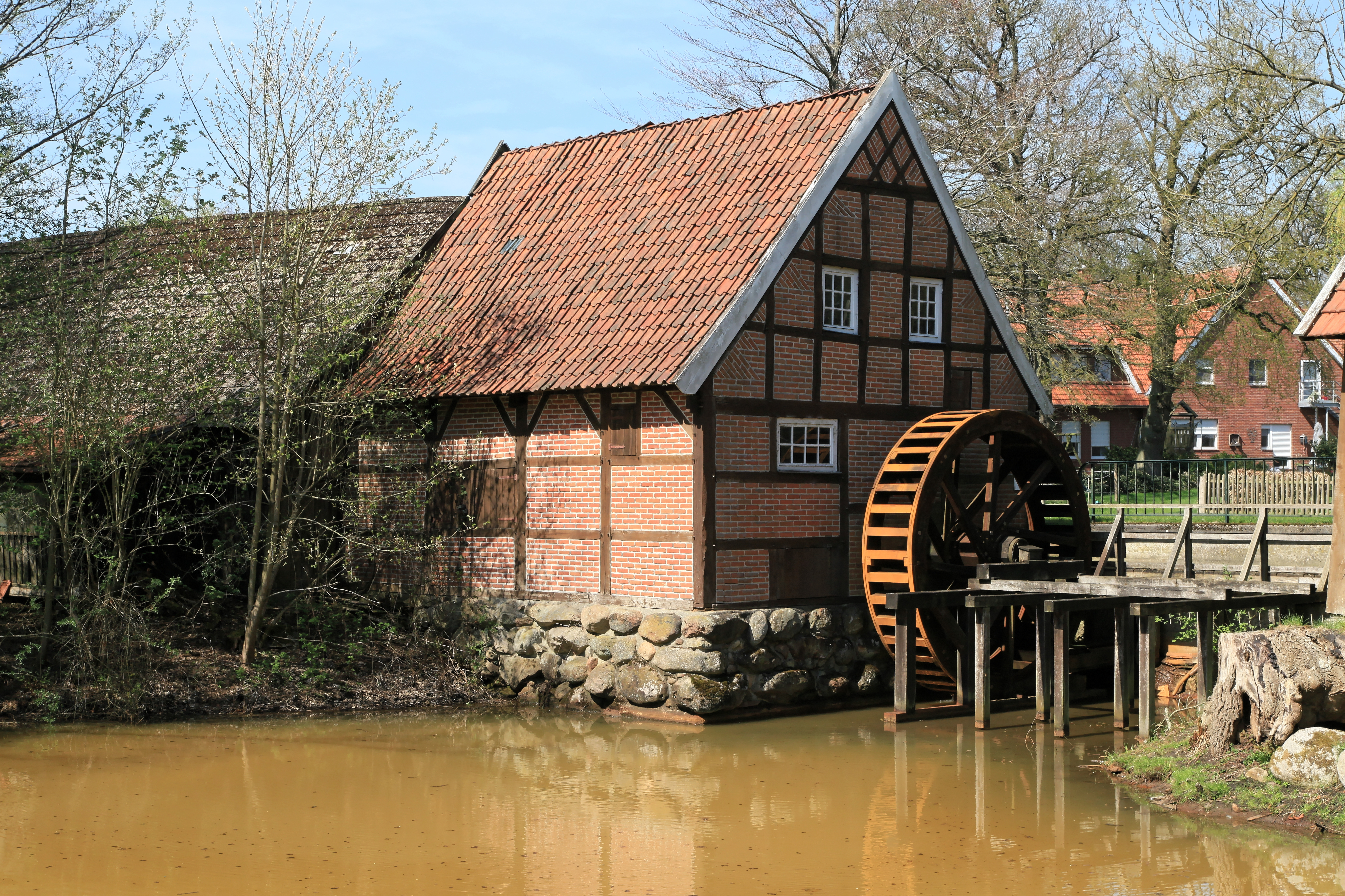 Wassermühle Bruneforth, Staverner Straße in Stavern